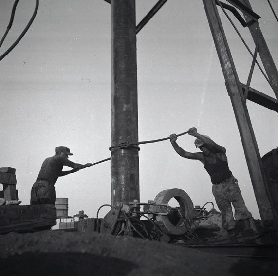 כפר סולד - קדיחת באר בכפר הנריטה סולד.